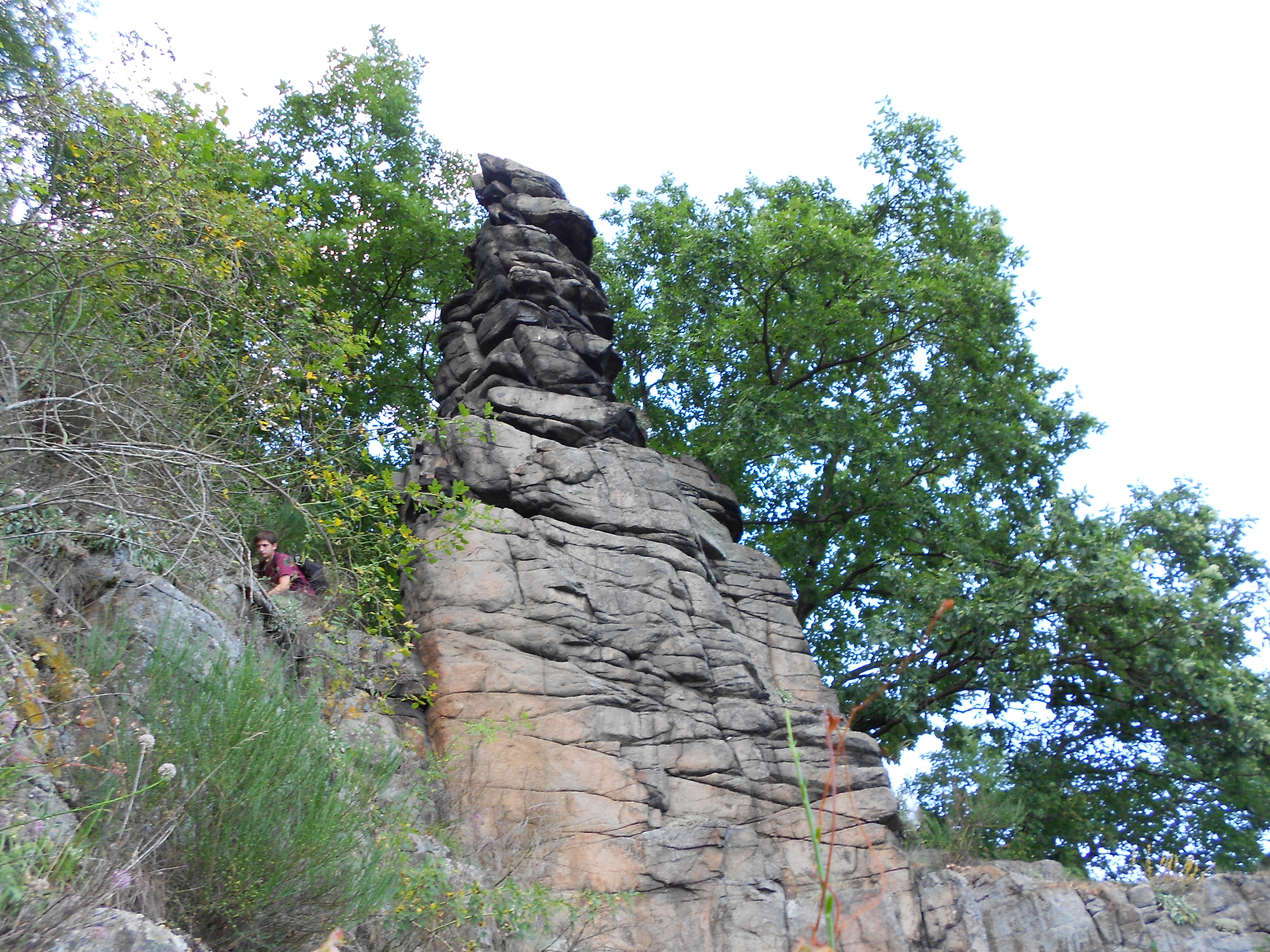 Mohutný sloup trčící ze země je dominantou skalního města Velká.